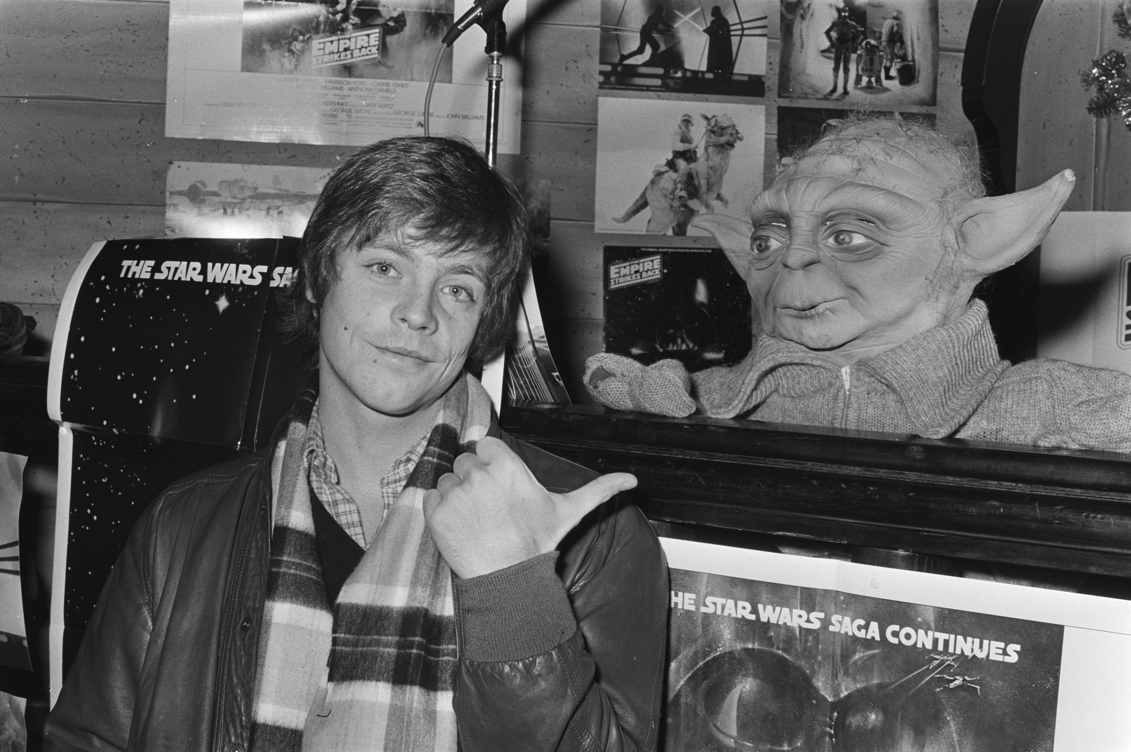 Collectie / Archief : Fotocollectie Anefo Reportage / Serie : [ onbekend ] Beschrijving : Amerikaanse akteur Mark Hamill die de rol speelt van Luke Skywalker in de film "The Empire strikes back" gaf persconferentie, Mark Hamill Datum : 18 december 1980 Locatie : Amsterdam, Noord-Holland Trefwoorden : persconferenties Persoonsnaam : EMPIRE Fotograaf : Bogaerts, Rob / Anefo Auteursrechthebbende : Nationaal Archief Materiaalsoort : Negatief (zwart/wit) Nummer archiefinventaris : bekijk toegang 2.24.01.05 Bestanddeelnummer : 931-2164